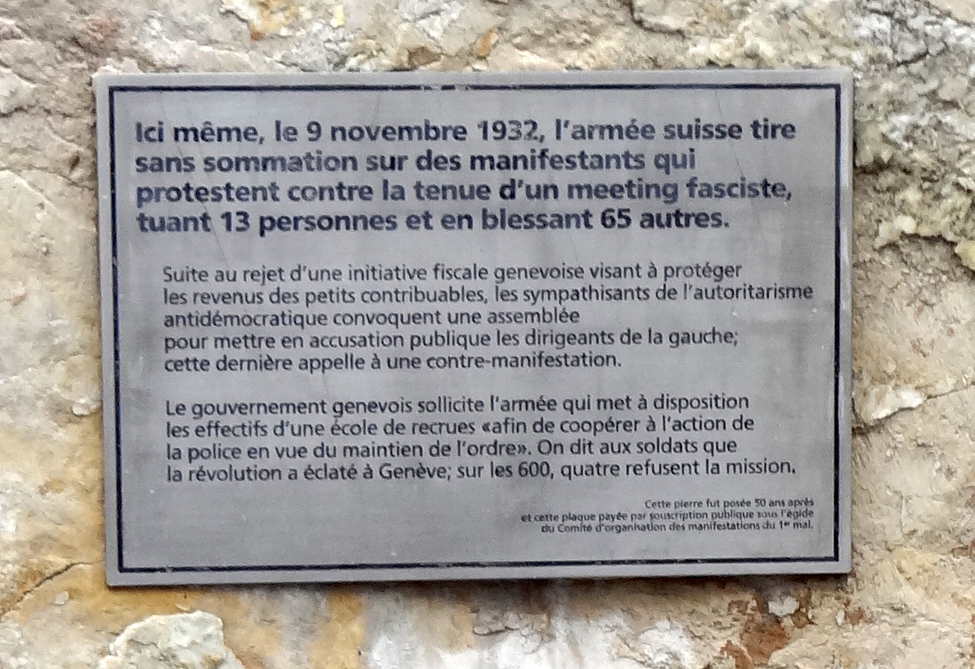 Monument commémoratif des événements du 9 novembre 1932 à Genève. Détail : plaque.